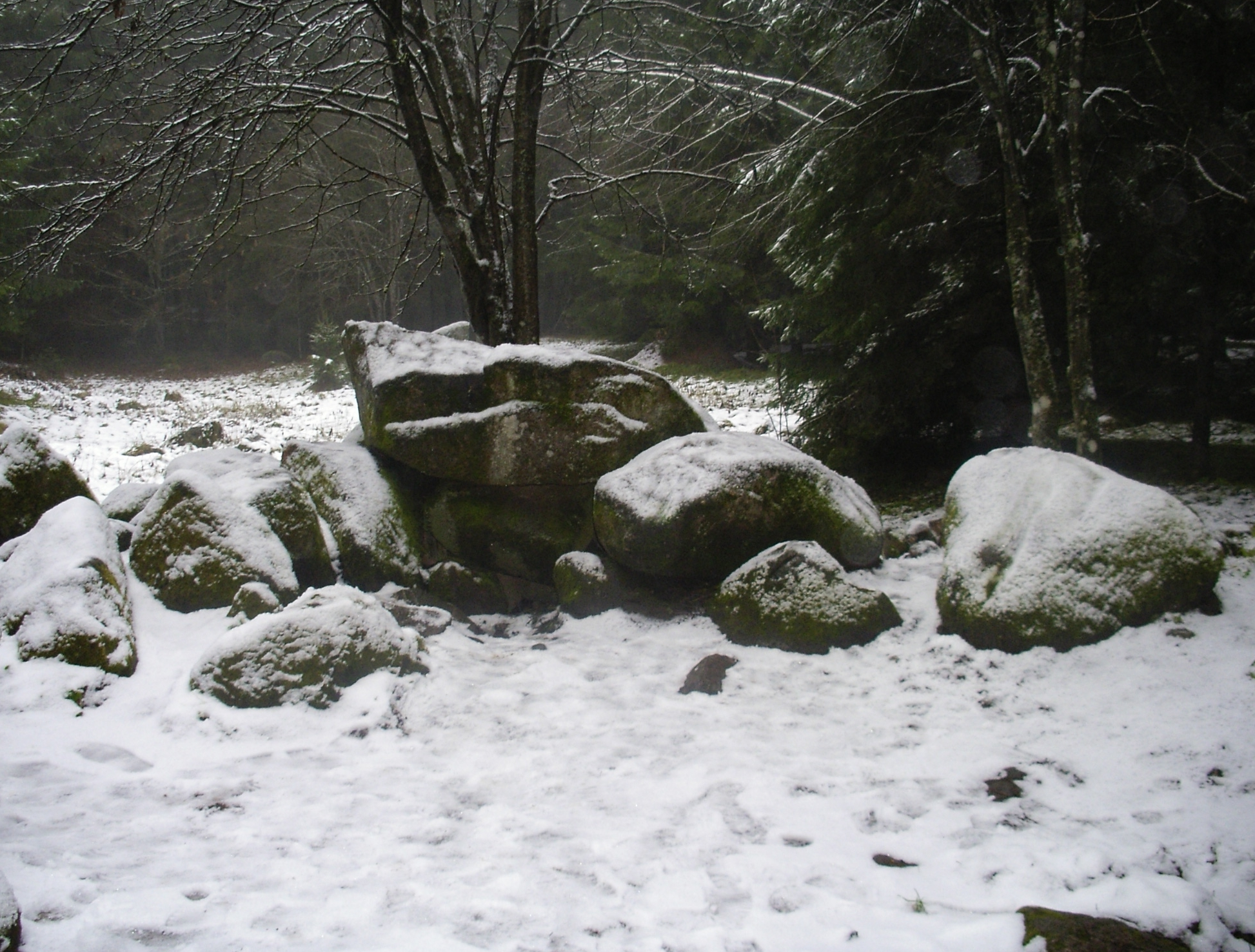 Tverų dolmenas